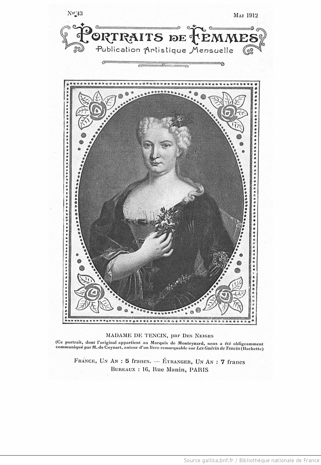 Portraits de femmes : publication artistique bimensuelle / [texte signé : Émile Henriot] Auteur : Henriot, Émile (1889-1961). Auteur du texte Éditeur : [s.n.] (Paris) Date d'édition : 1912-05 Droits : domaine public Identifiant : ark:/12148/bpt6k205653g Source : Bibliothèque nationale de France Notice du catalogue : Notice du catalogue : Provenance : Bibliothèque nationale de France